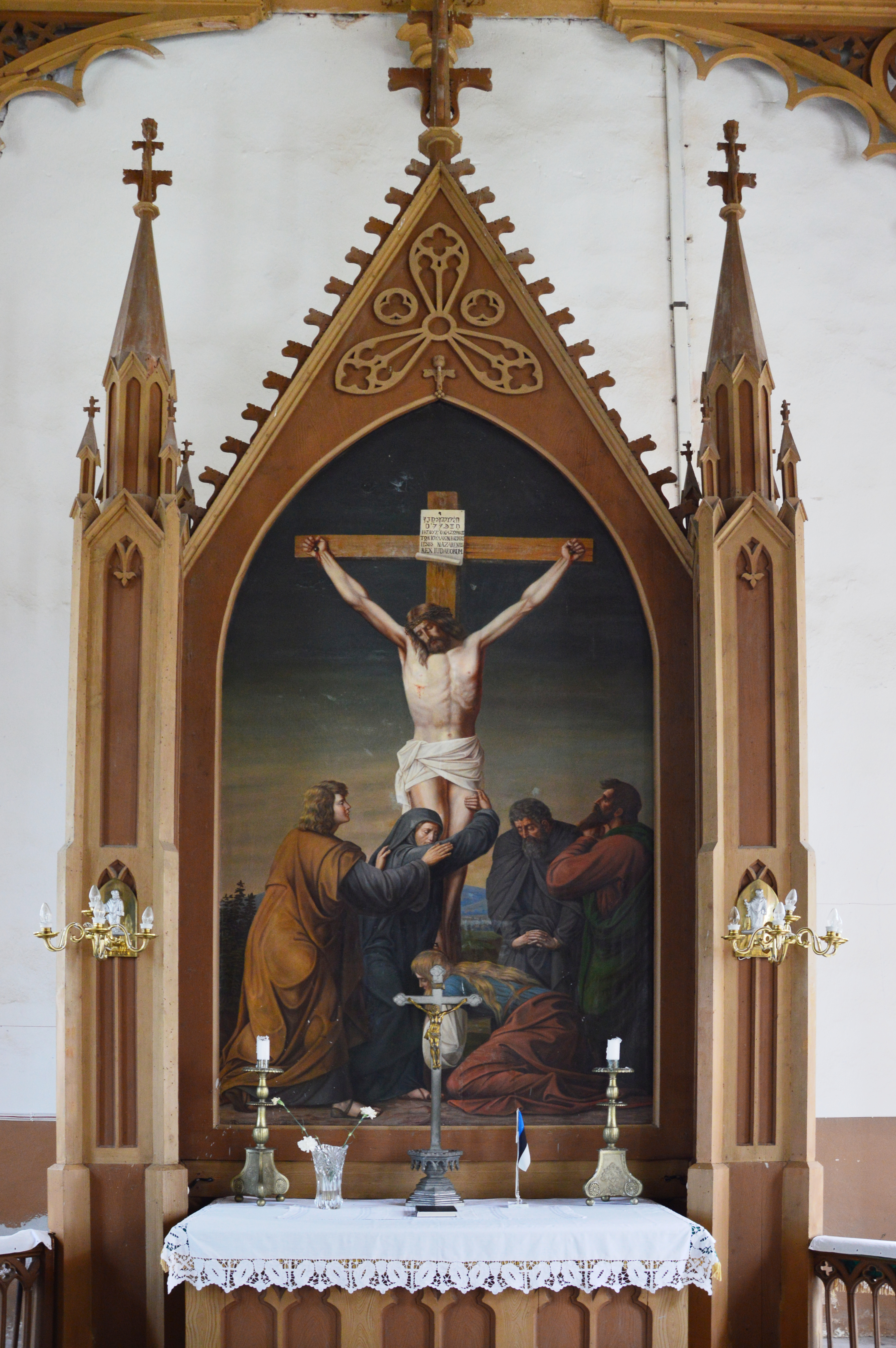 Altarimaal "Kolgata" Otepää kirikus